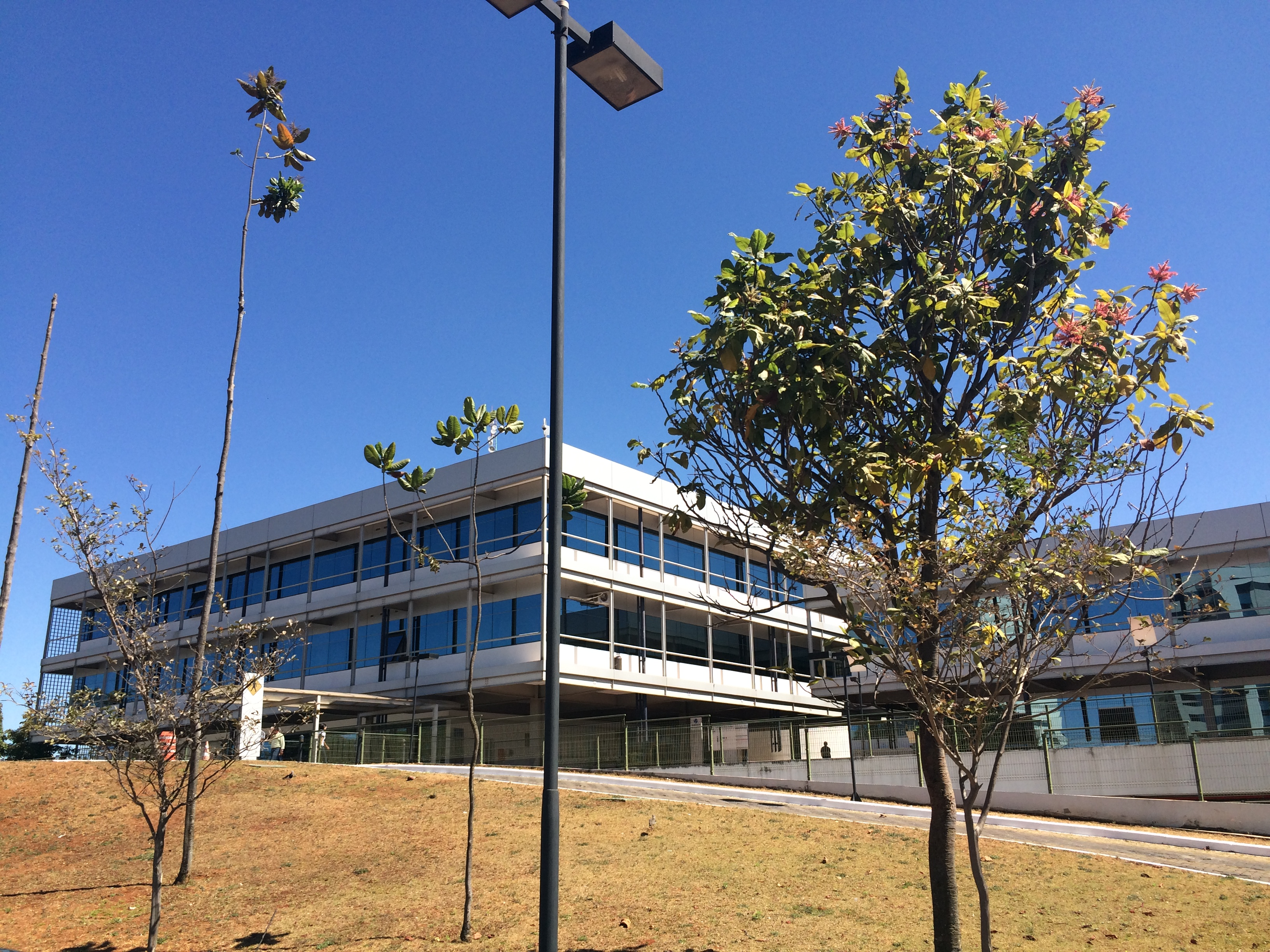 Fachada da sede